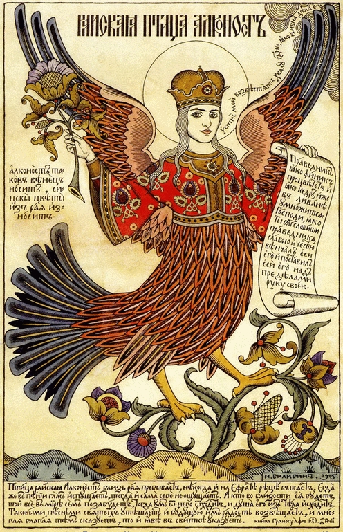 Птица Алконост Билибин Иван Яковлевич Издание Общ. Св. Евгении